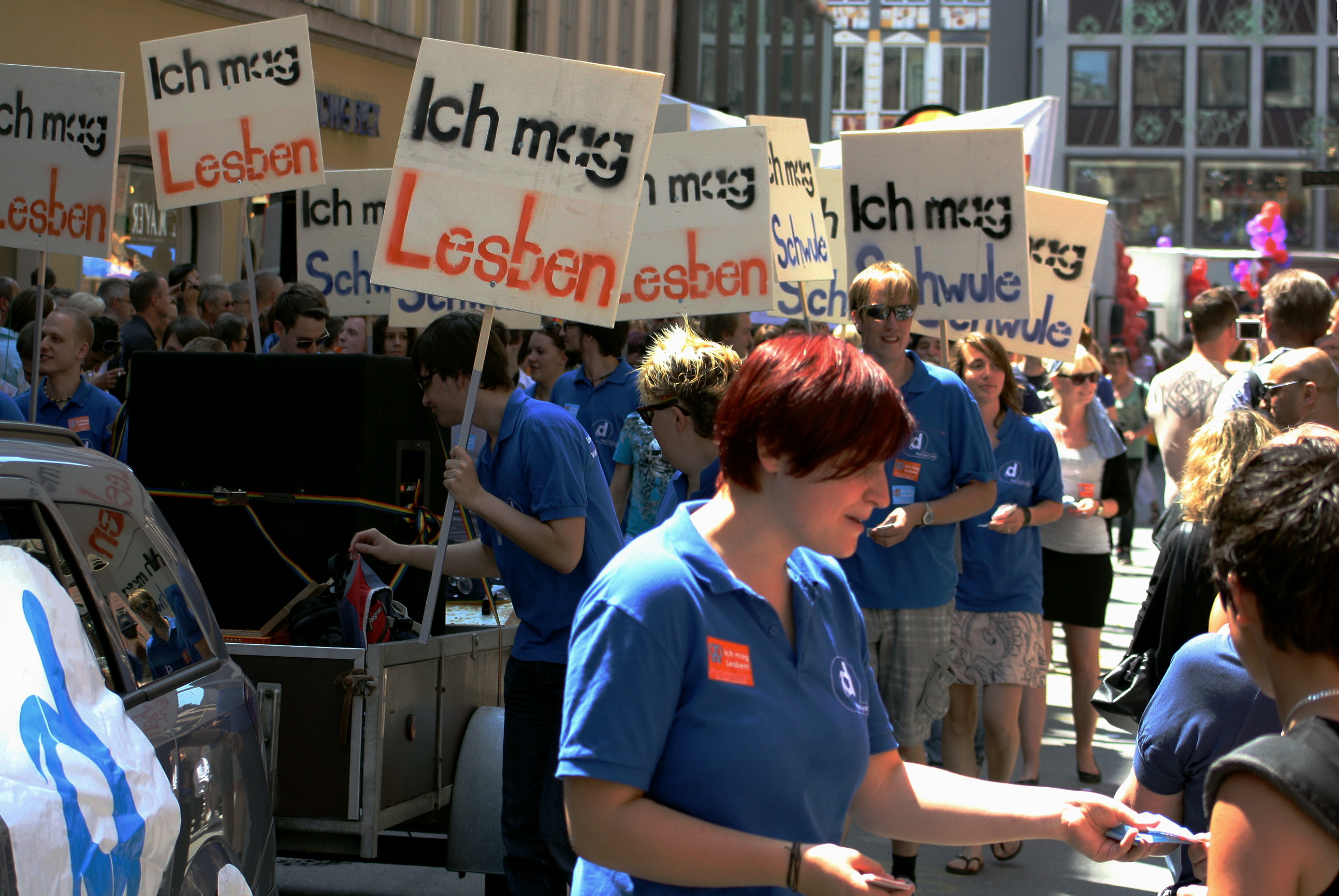 CSD 2011 in München